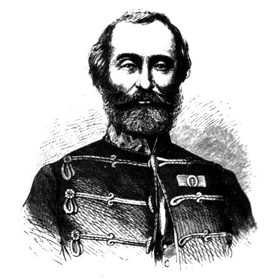 Czetz János (Rusz Károly fametszete)